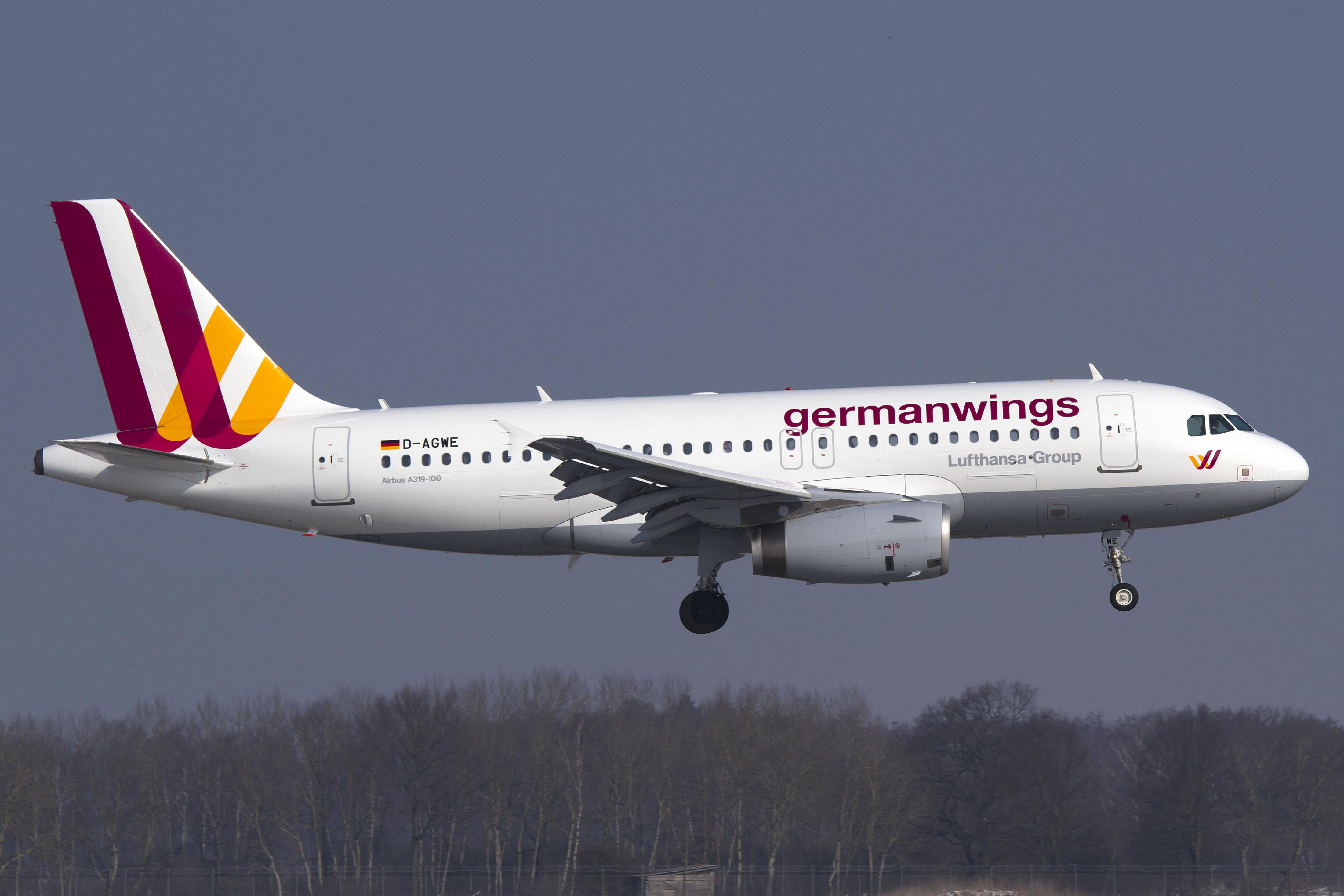 D-AGWE